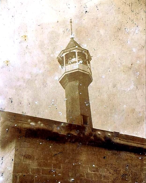 Мечеть 19 века в Акташ-Аухе (Пхьарчхошка)